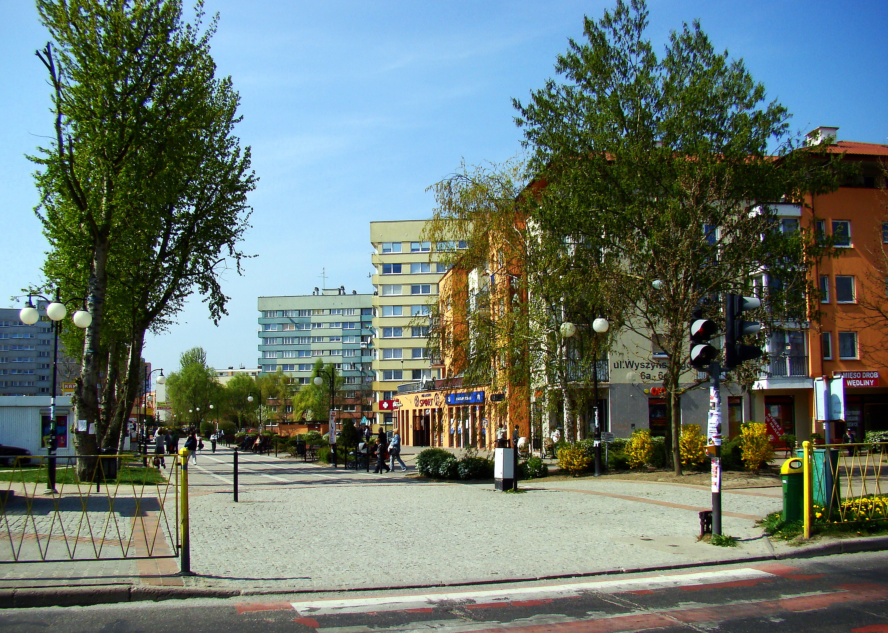 Osiedle Anny Jagiellonki (Police, Województwo zachodniopomorskie), Polska